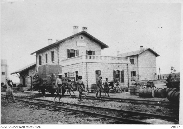 חיילים בריטיים מתקנים את המסילה בחזית תחנת הרכבת הטורקית בטול כרם